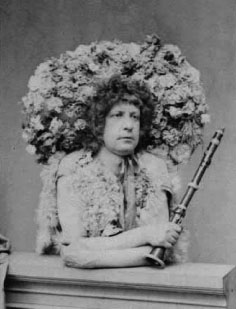 Édouard Nicole dit Léonce dans le rôle d'Aristée d'Orphée aux Enfers aux Bouffes-Parisiens